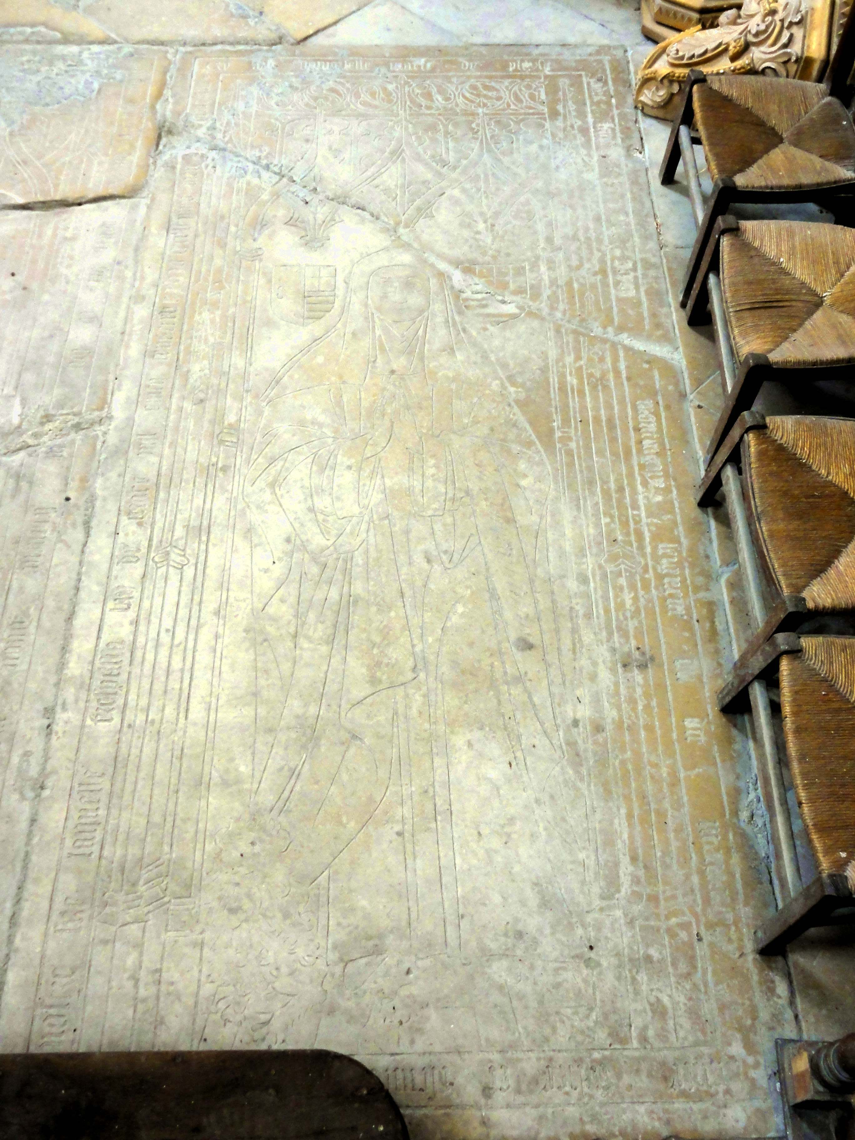 Mobilier de l'église (voir titre).